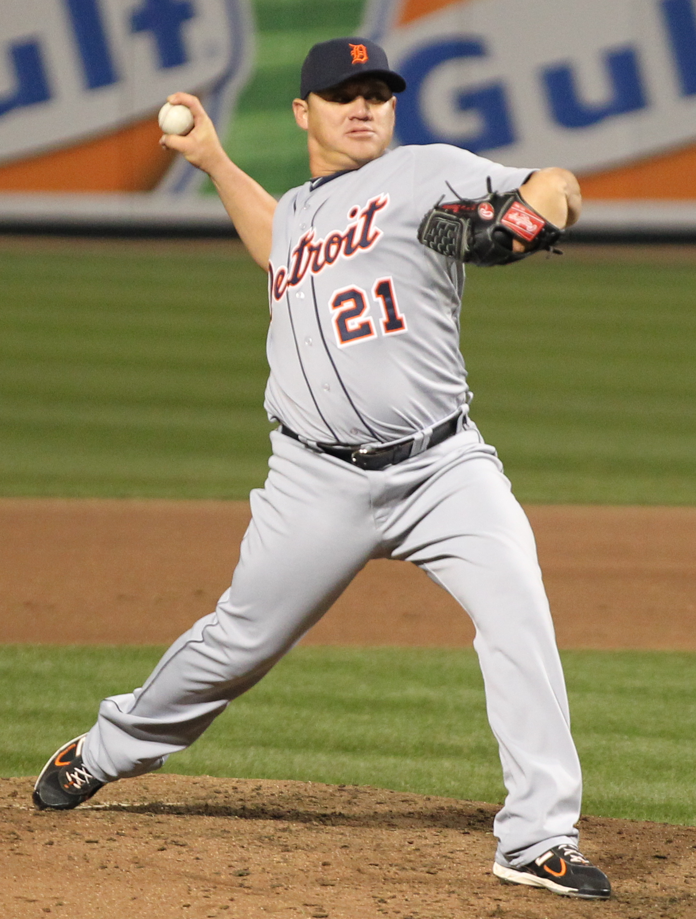 Enrique González